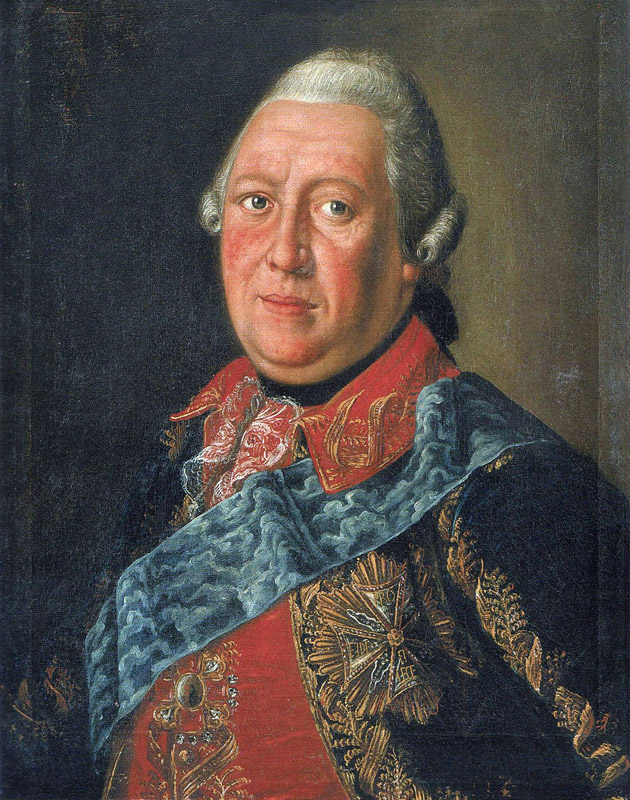 Иван Семёнович Гендриков